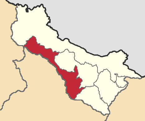 Mapa localizacor del cantón Bolívar, Carchi, Ecuador